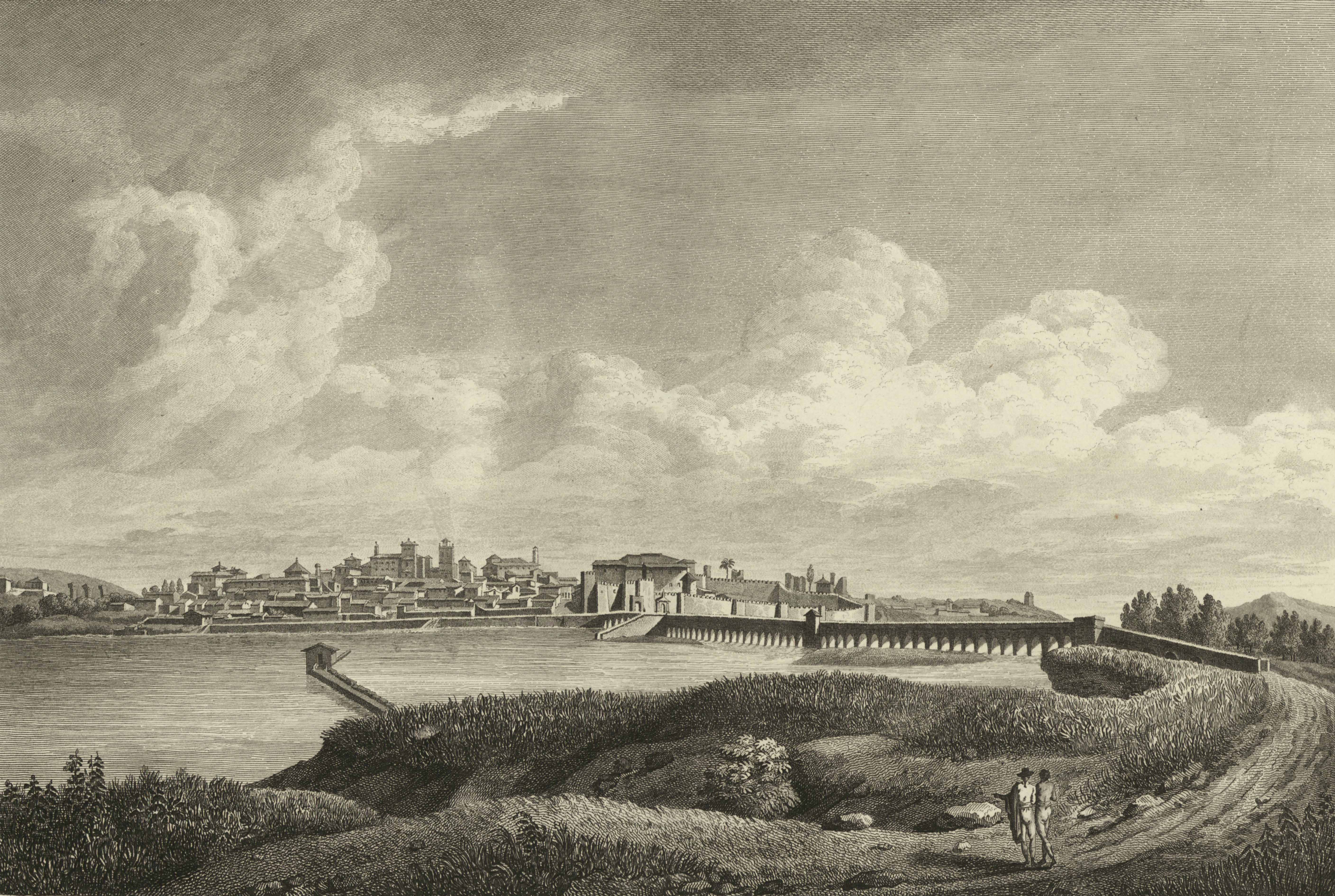 Vista general de la ciudad de Mérida.